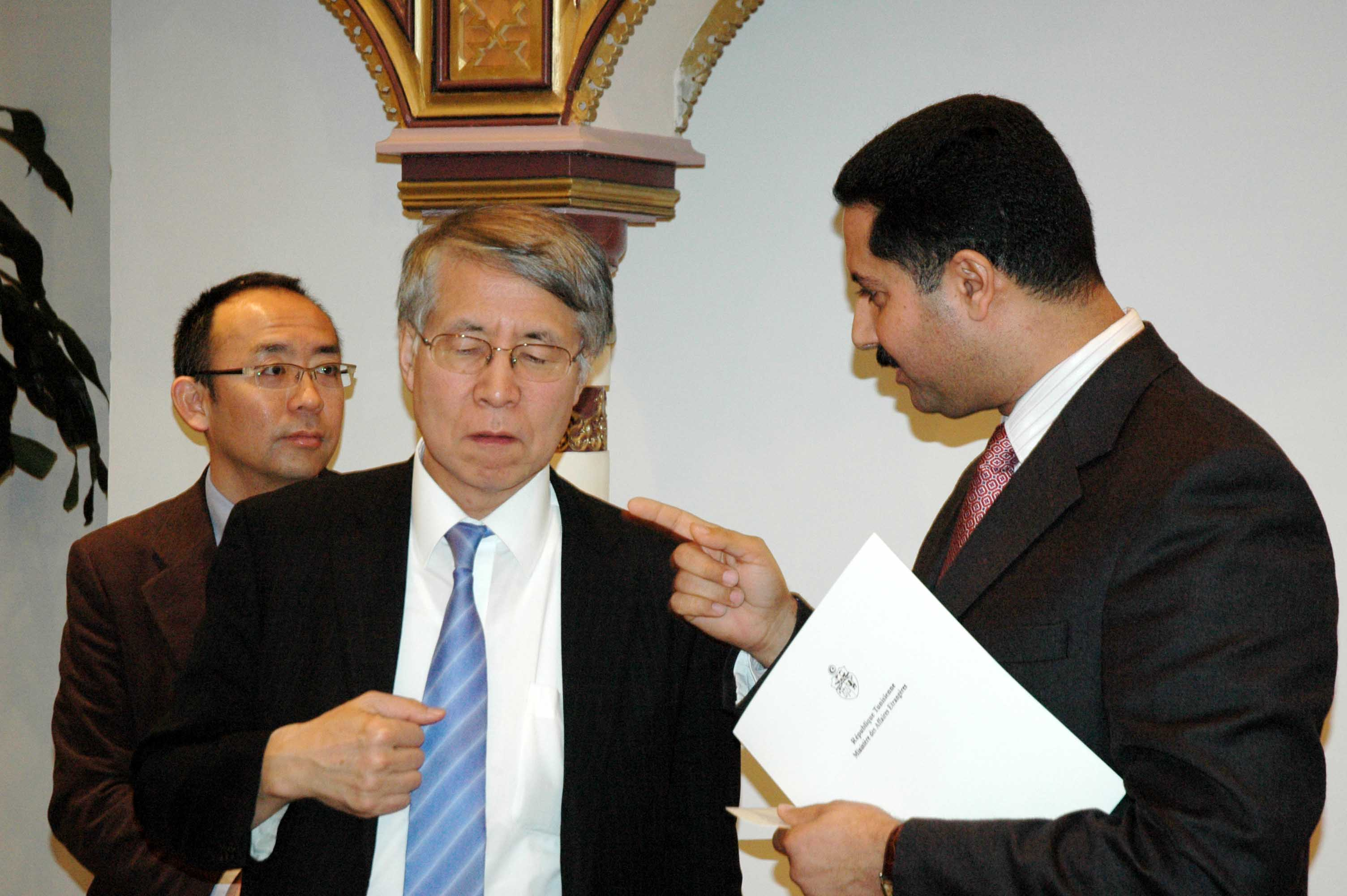 Un groupe de travail consacré à la Tunisie a été créé lors de la réunion ministérielle de la Communauté des démocraties qui s’était tenue en juillet 2011 à Vilnius (Lituanie), au cours de laquelle la Tunisie avait présenté un plan d’action portant sur les priorités de la Tunisie durant la phase de transition en matière de réforme du secteur de la sécurité, de la justice, et de l’administration publique, ainsi que du renforcement du développement régional et de la société civile.